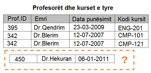 Insertimi